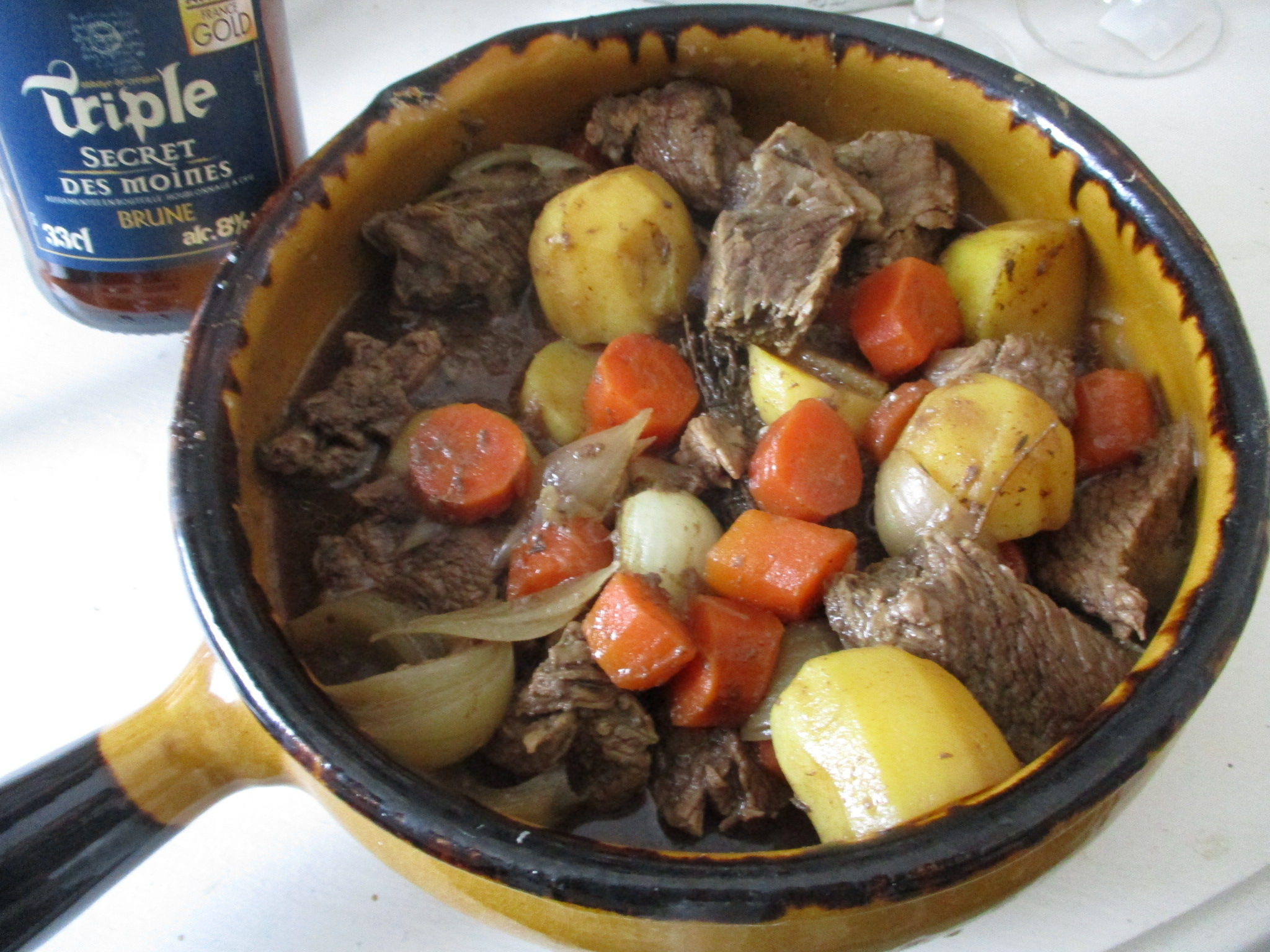 Carbonade flamande